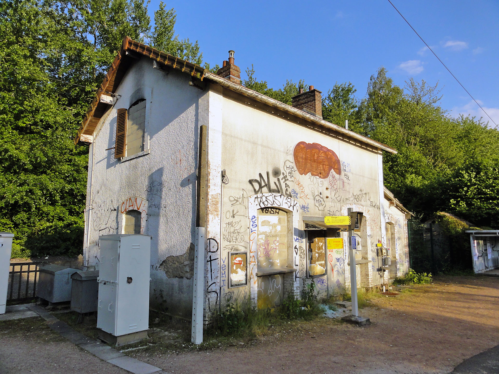 La gare de Lavilletertre, Oise, France.